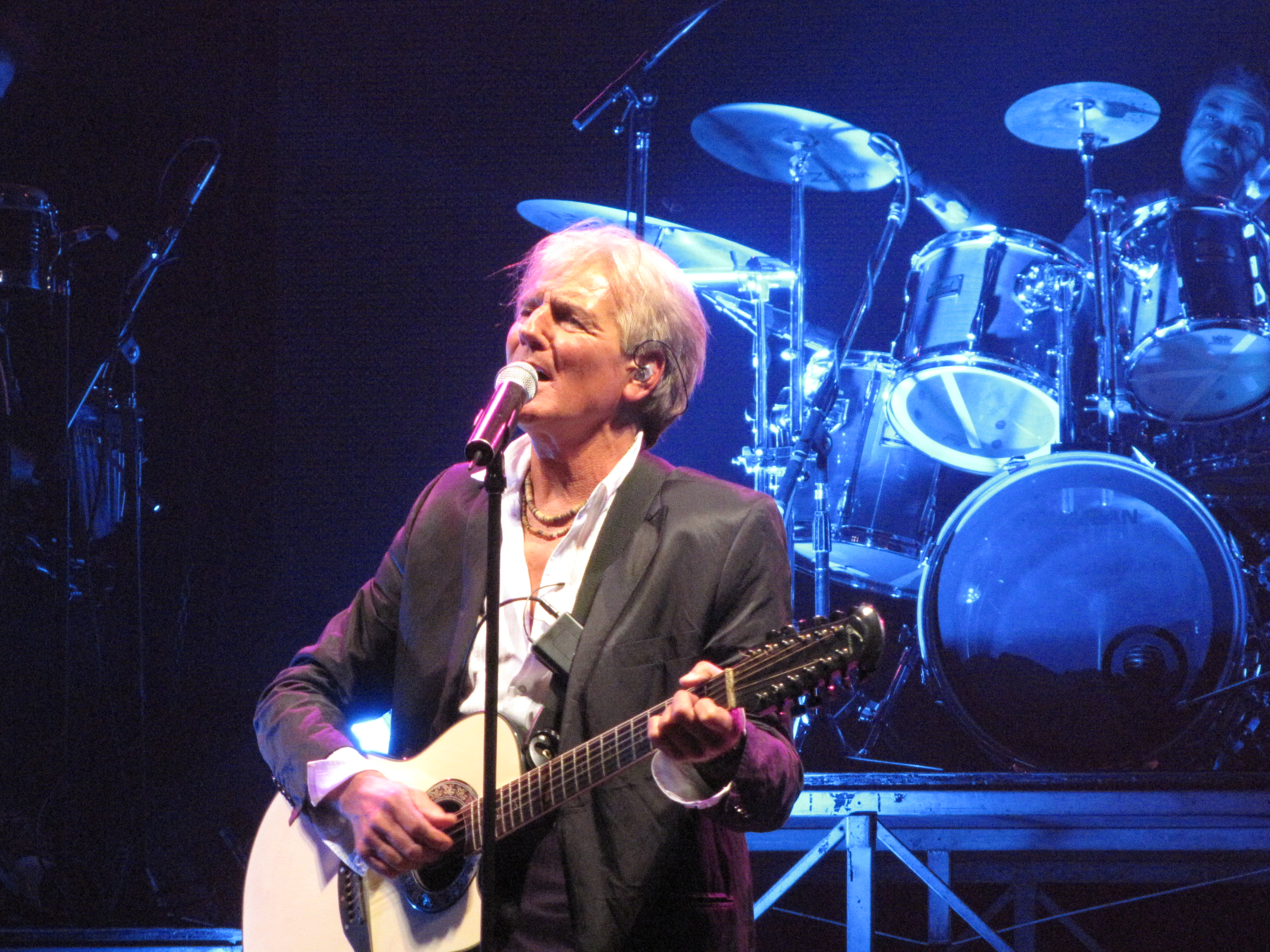 Foto Gran Rex 17 de octubre de 2009